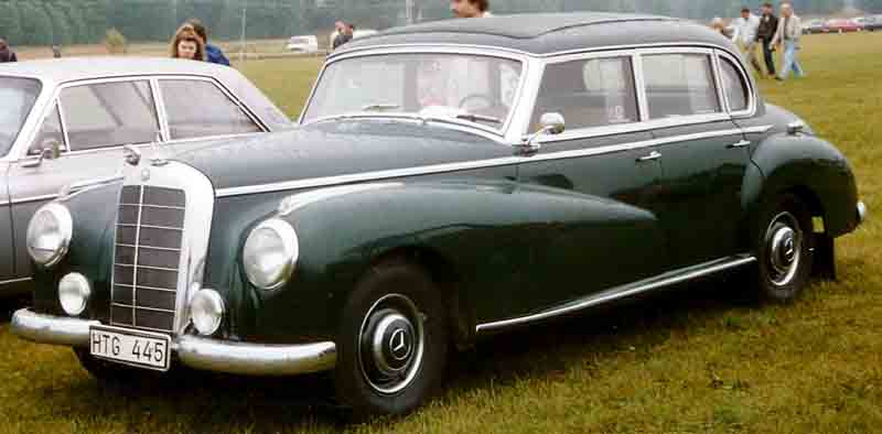 Mercedes-Benz 300 Limousine 1953